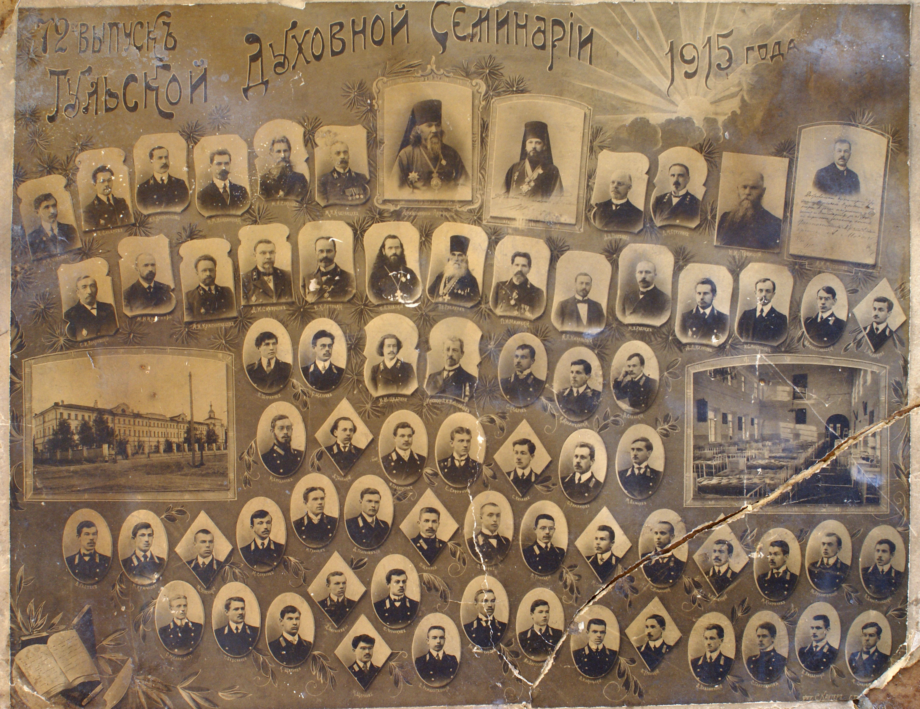 Выпускники Тульской духовной семинарии 1915 года